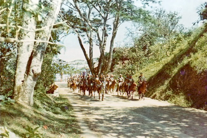 Um pelotão a cavalo